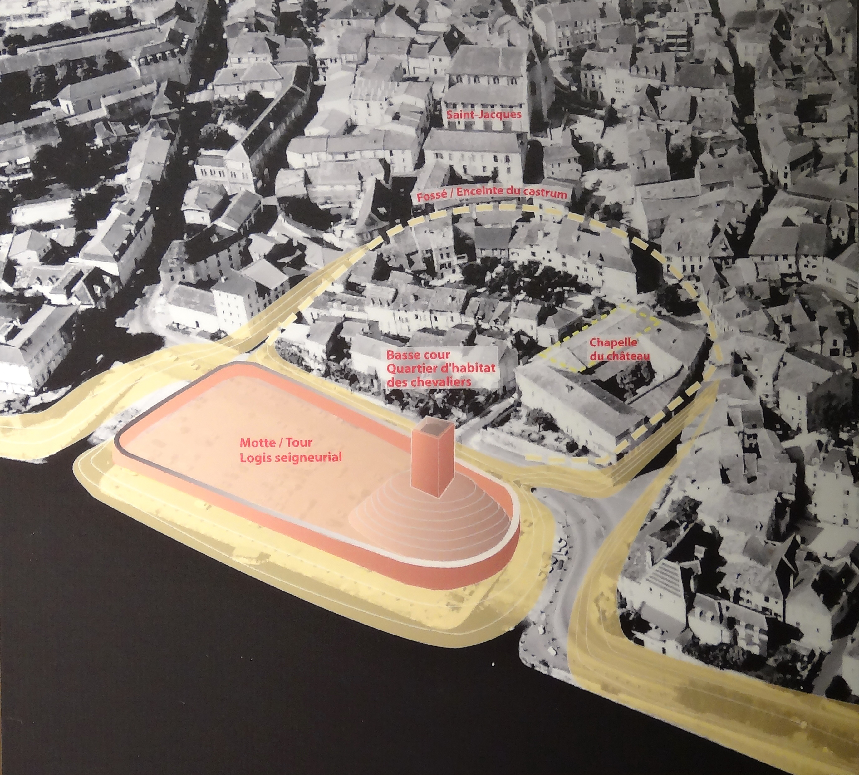 La motte qui portrait la tour du château de Bergerac (quai Salvette)